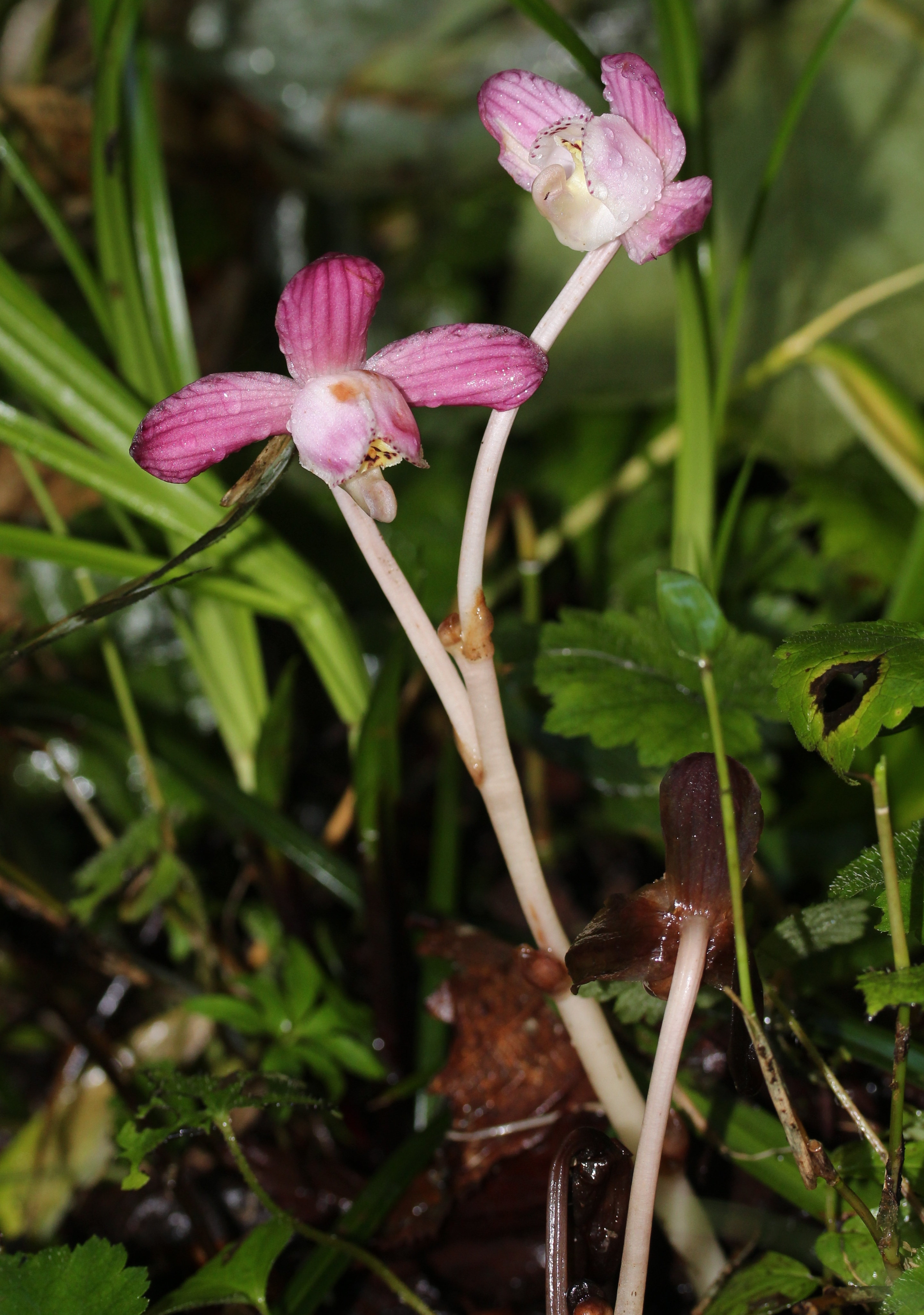 ショウキラン（鍾馗蘭、学名：Yoania japonica Maxim. ）、蝶ヶ岳（長野県安曇野市）にて